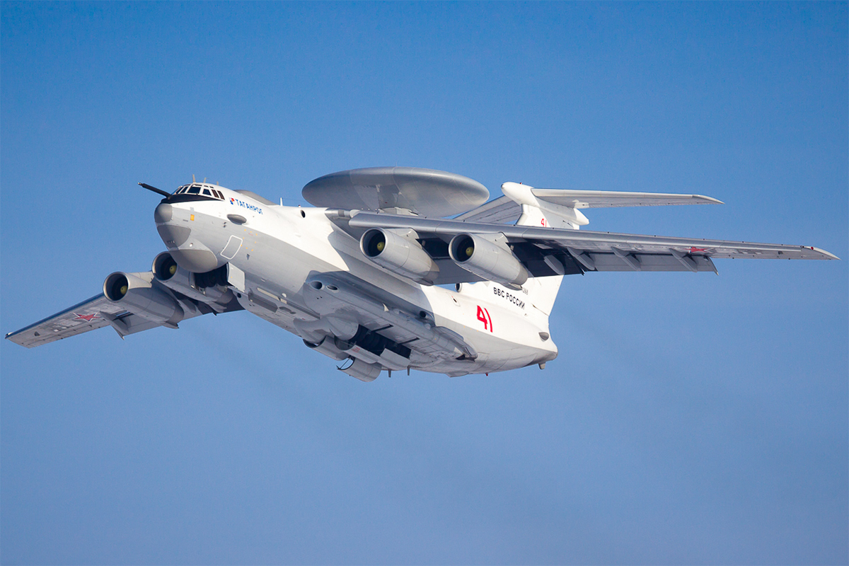 Встреча нового самолета дальнего радиолокационного обнаружения и управления А-50У (г. Иваново)